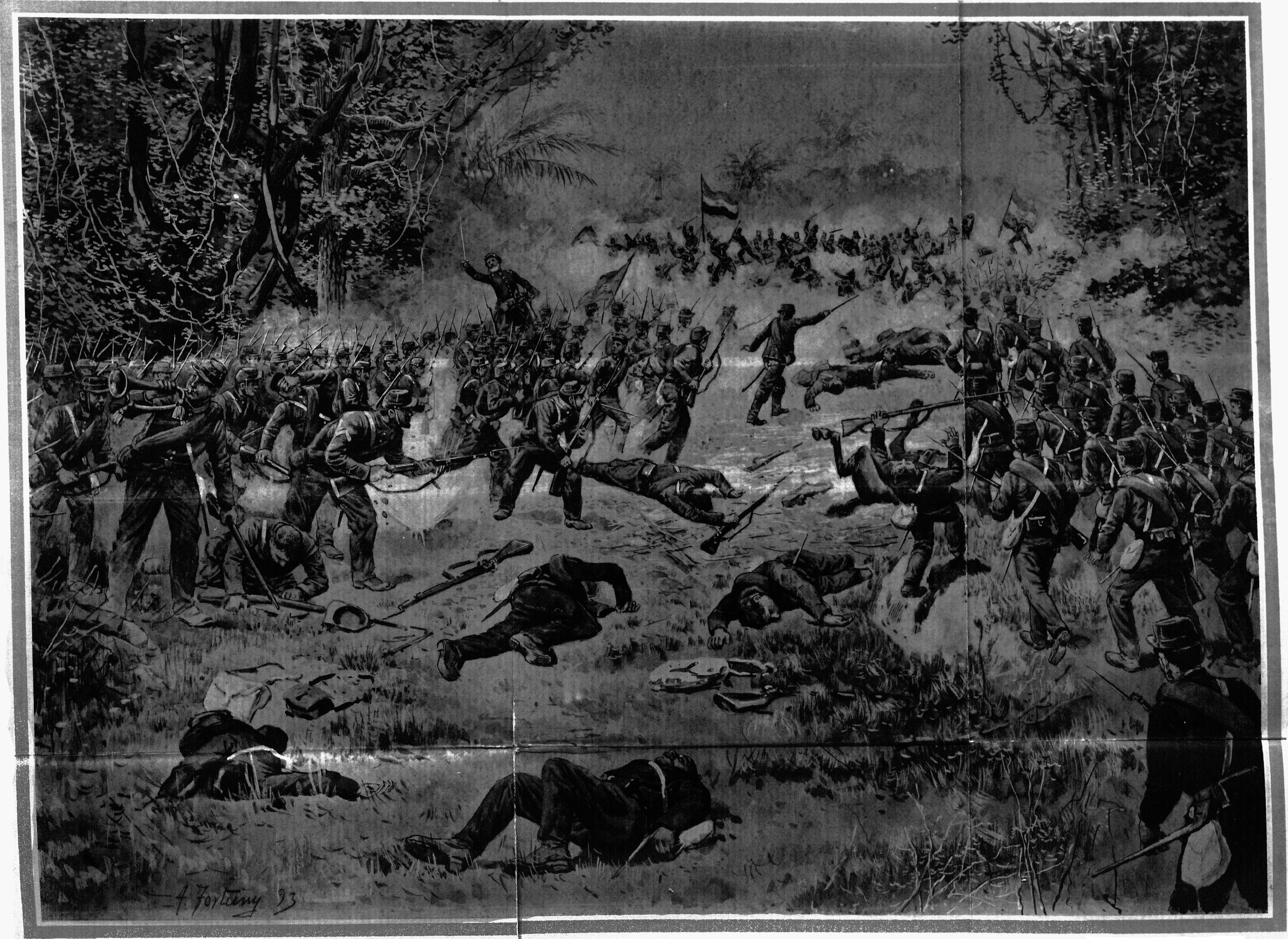 Ataque de la 3ª Division del 2º Cuerpo deEjercito á las órdenes del Coronel D. Cesáreo Dominguez à la trinchera paraguaya del Boqueron de Piris (Batalle del "Sauce" de los Paraguayos). (Cuadro de F. Fortuny, Tomado de un Croquis del album del Sr. Gral. D. J. I. Garmendia).